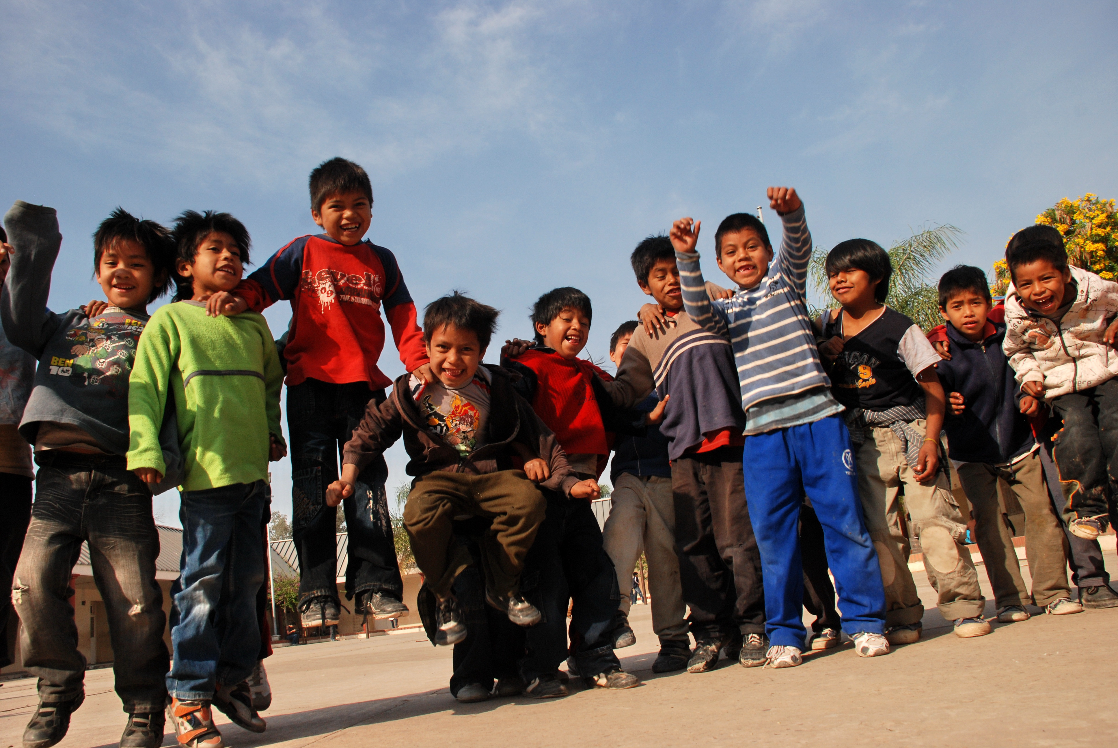 Comunidad Mbya Guaraní, Kaaguy Poty - Misiones